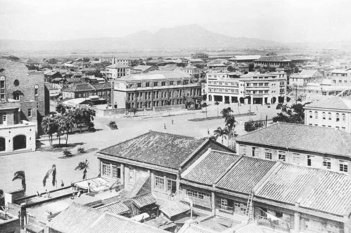 臺北公會堂附近城市景觀。